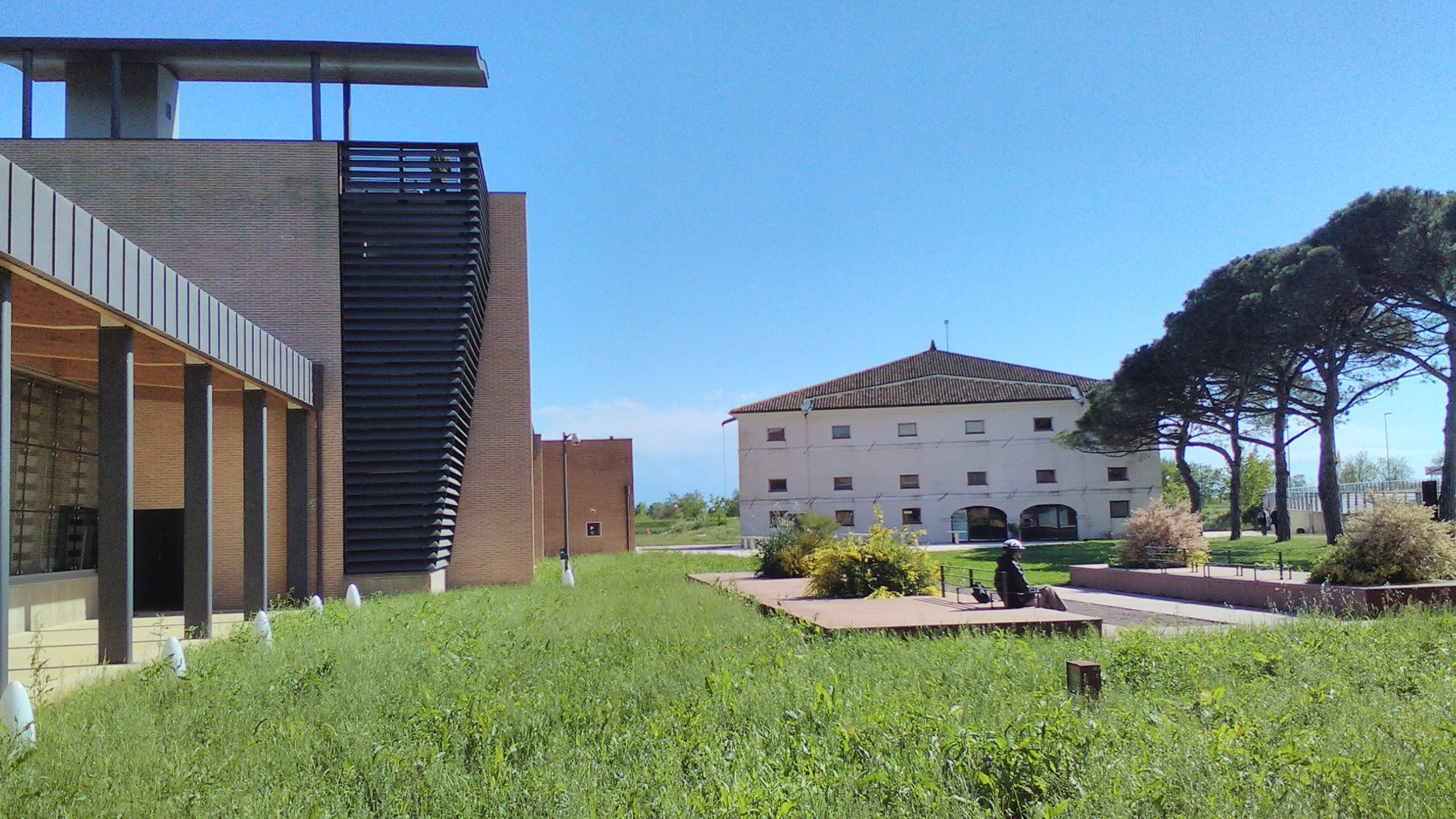 Museo Archeologico Nazionale di Altino